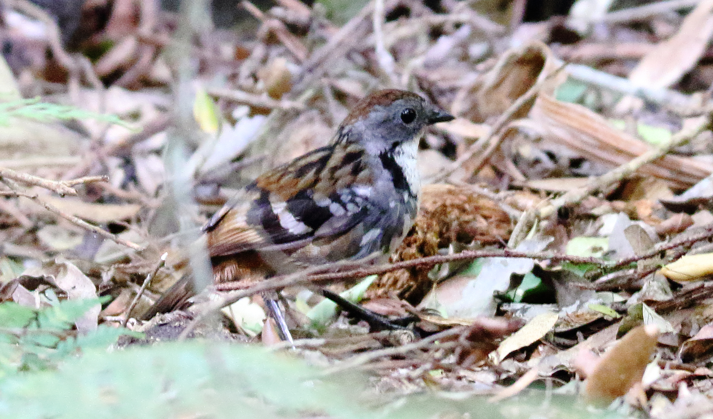 male